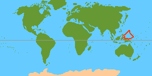 Journey of Íñigo Ortiz de Retez 1545